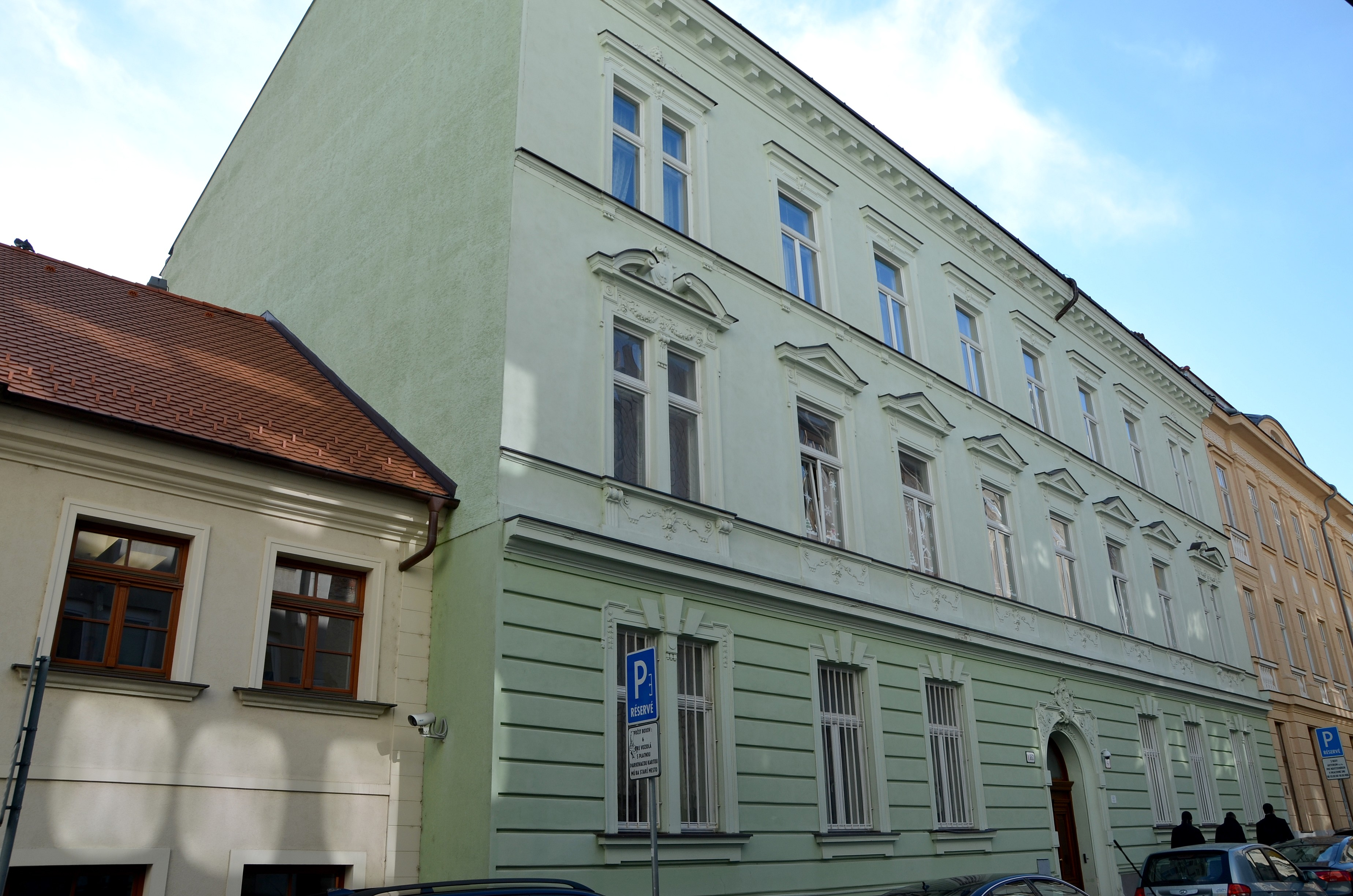 Panenská ul. č. 4. Celkový pohľad na dom